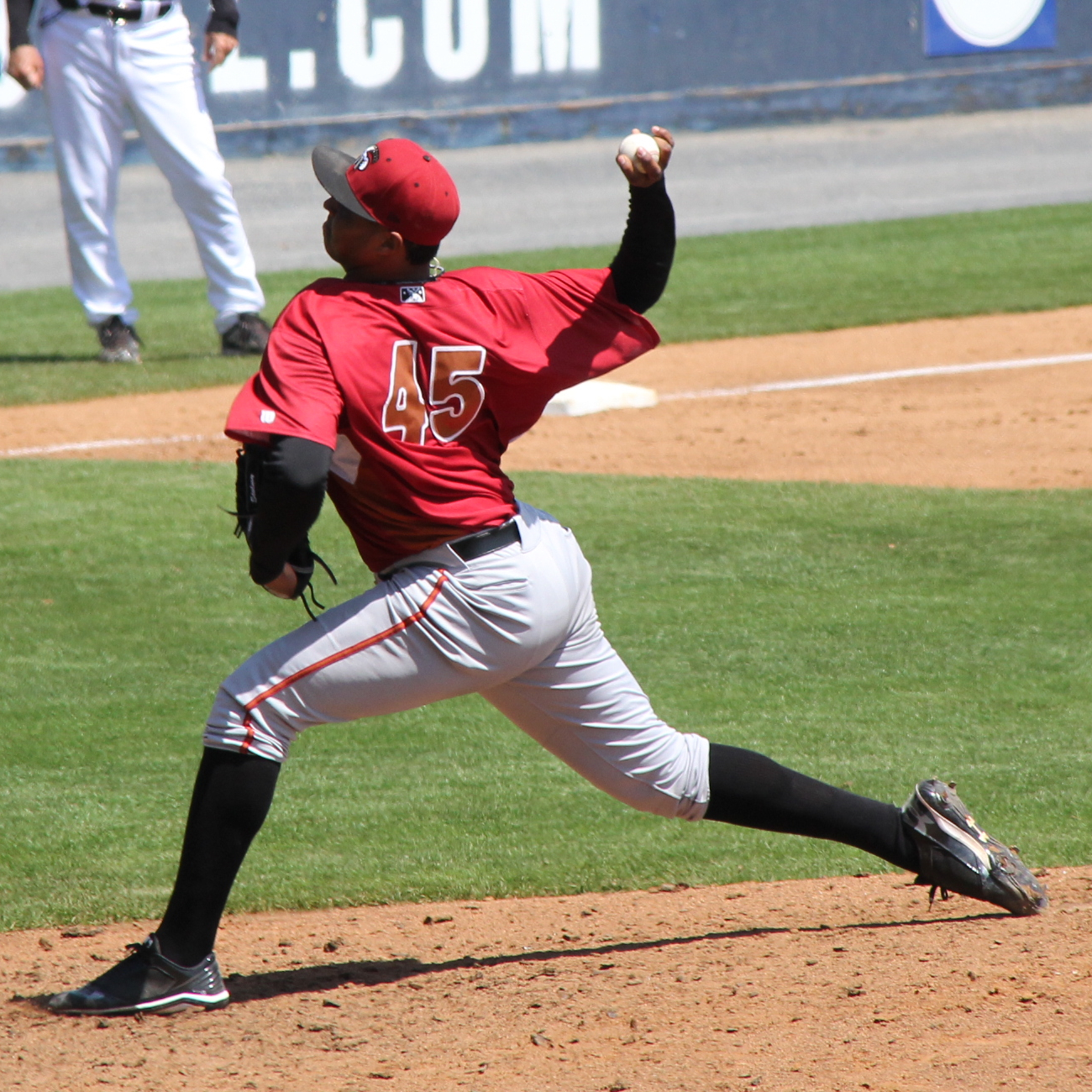 Stolmy Pimentel